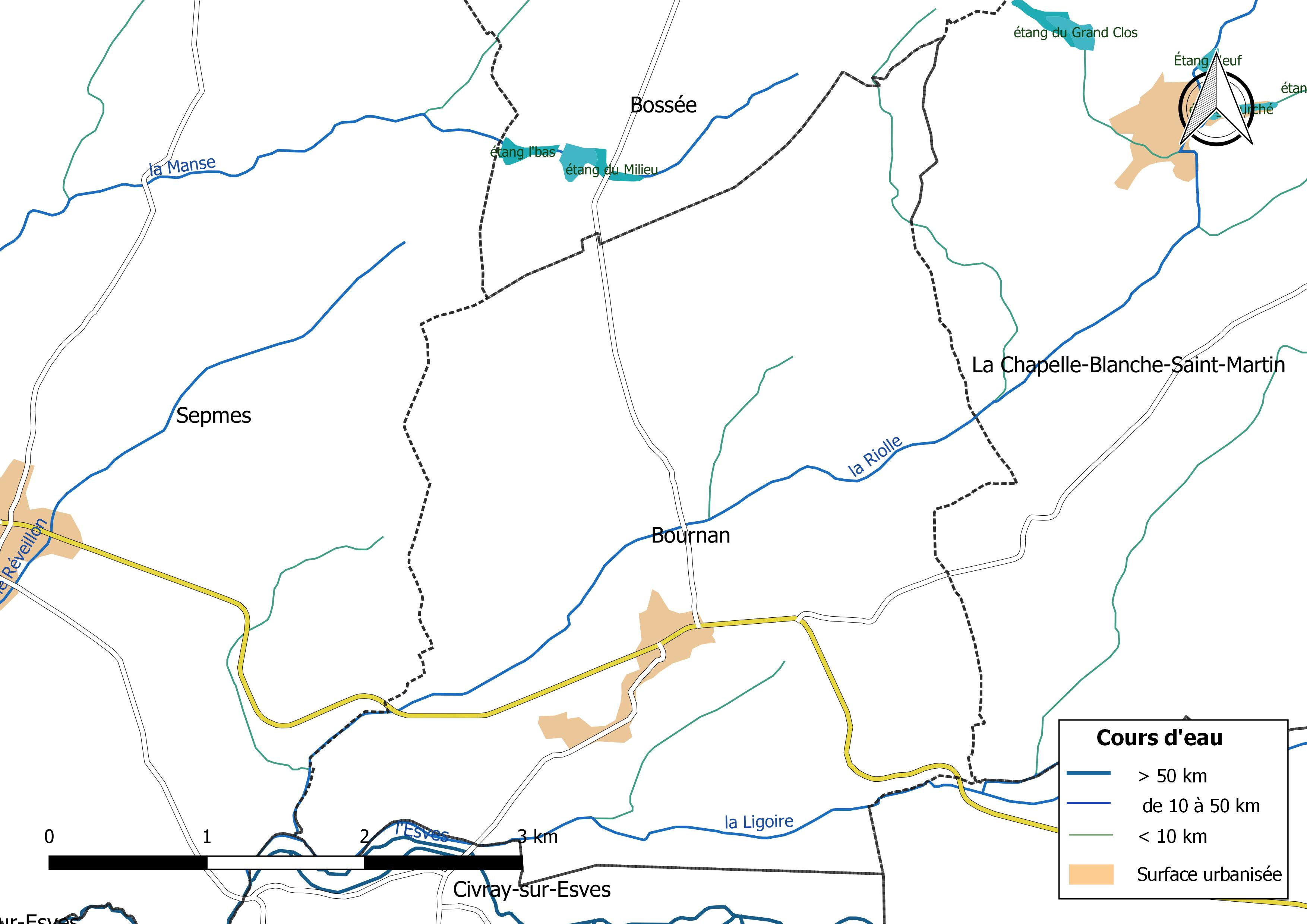 Carte du réseau hydrographique de la commune de Bournan (France).